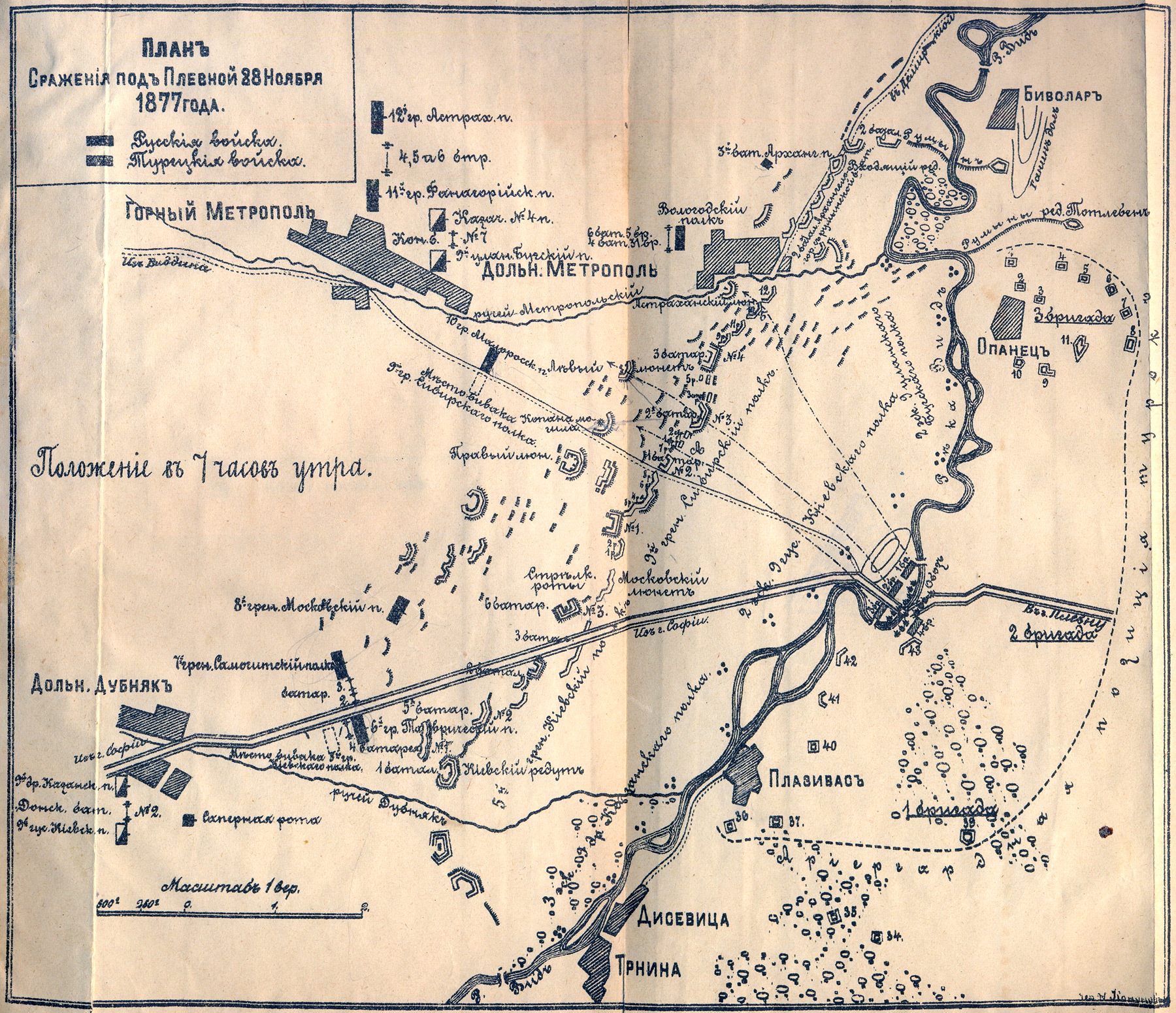 Разположение на обсадните руски войски на 10 Декември 1877 г. по време на пробива на Осман паша.